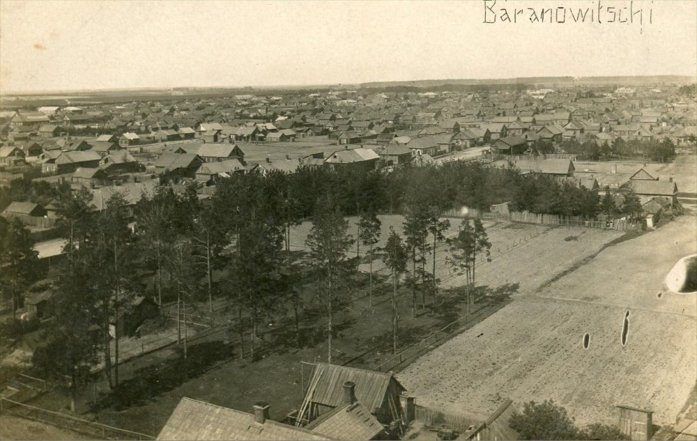 Беларуская (тарашкевіца): Баранавічы (Baranavičy), меская ўскраіна